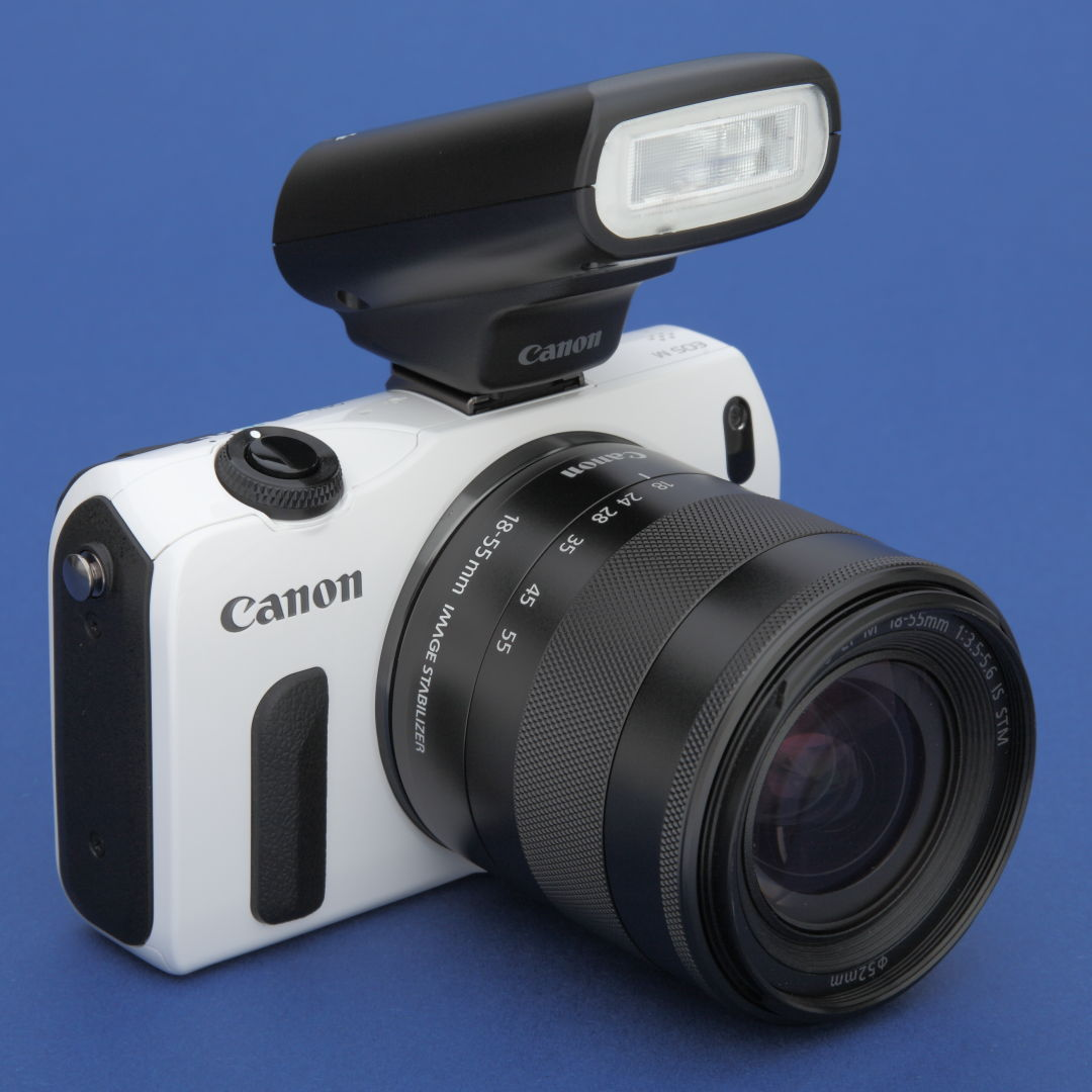 Canon EOS M mit EF-M 18-55mm f/3.5-5.6 IS STM und Speedlite 90EX